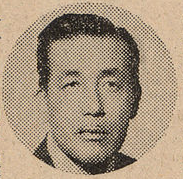 김용식은 대한민국의 법조인, 외교관, 행정관료, 정치가, 사회기관단체인이다.